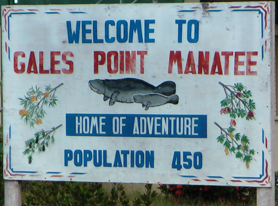 Gales Point Ortsschild